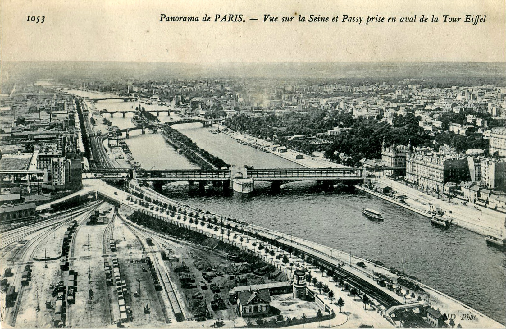 Carte postale ancienne éditée par ND Phot, N° 1053"Panorama de Paris : Vue sur la Seine prise en aval de la Tour Eiffel"Au premier plan, l'ancienne gare du Champ de Mars, puis le Pont de Passy, le Pont Rouelle qui supportait le raccordement de Boulainvilliers et aujourd'hui une branche du RER C, le Pont de Grenelle, le Pont Mirabeau puis enfin le viaduc d'Auteuil. Prise du 2ème étage de la Tour Eiffel.Pour comparaison, le même lieu en 1973